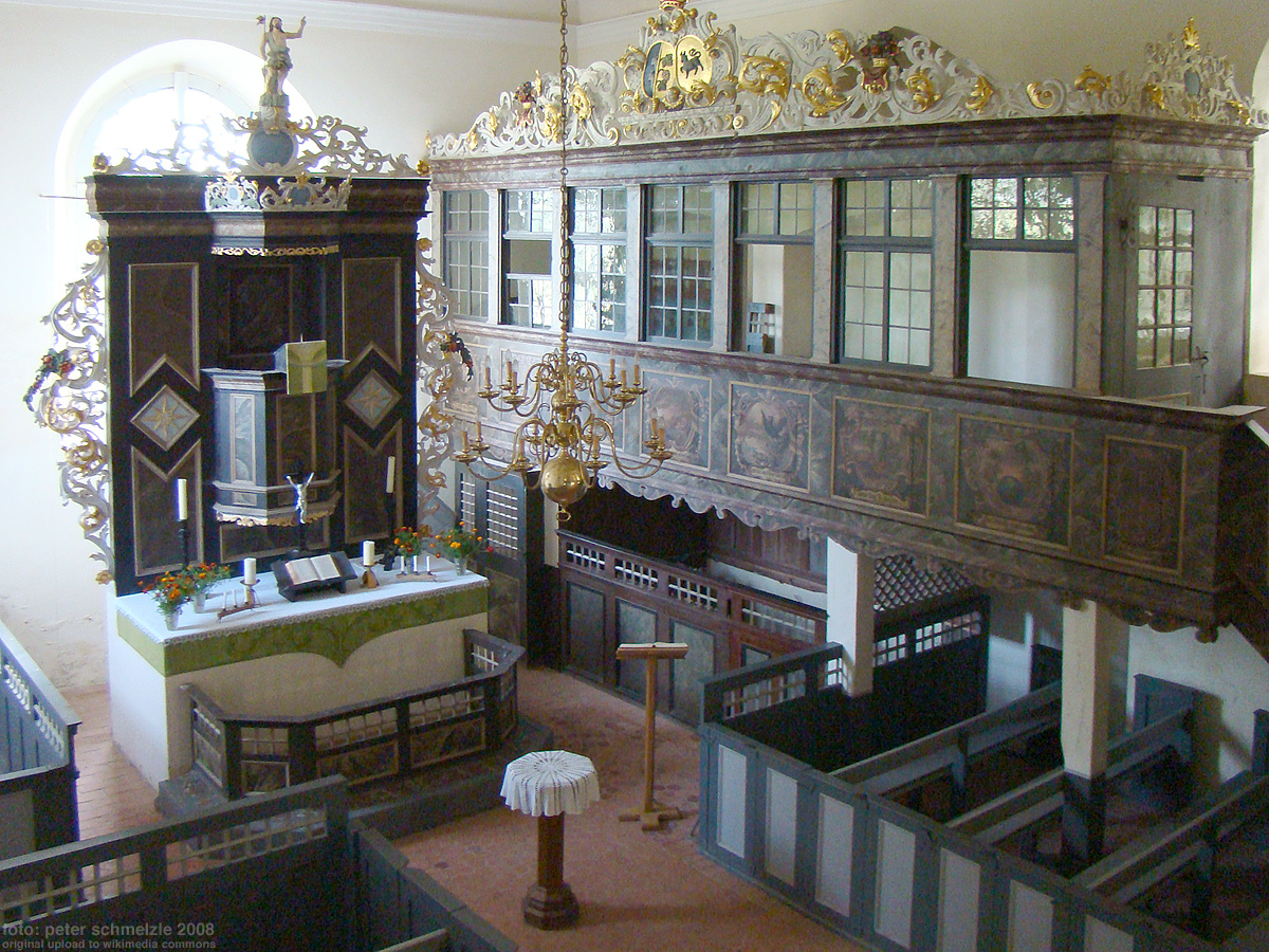 Dorfkirche in Kummerow am See, Patronatsloge und Altar